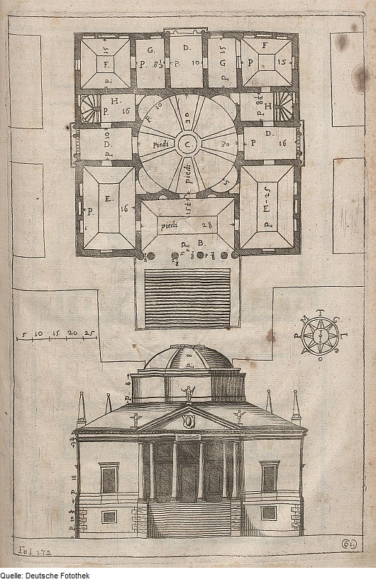 Original image description from the Deutsche Fotothek Architektur & Profanbau & Villa & Grundriss